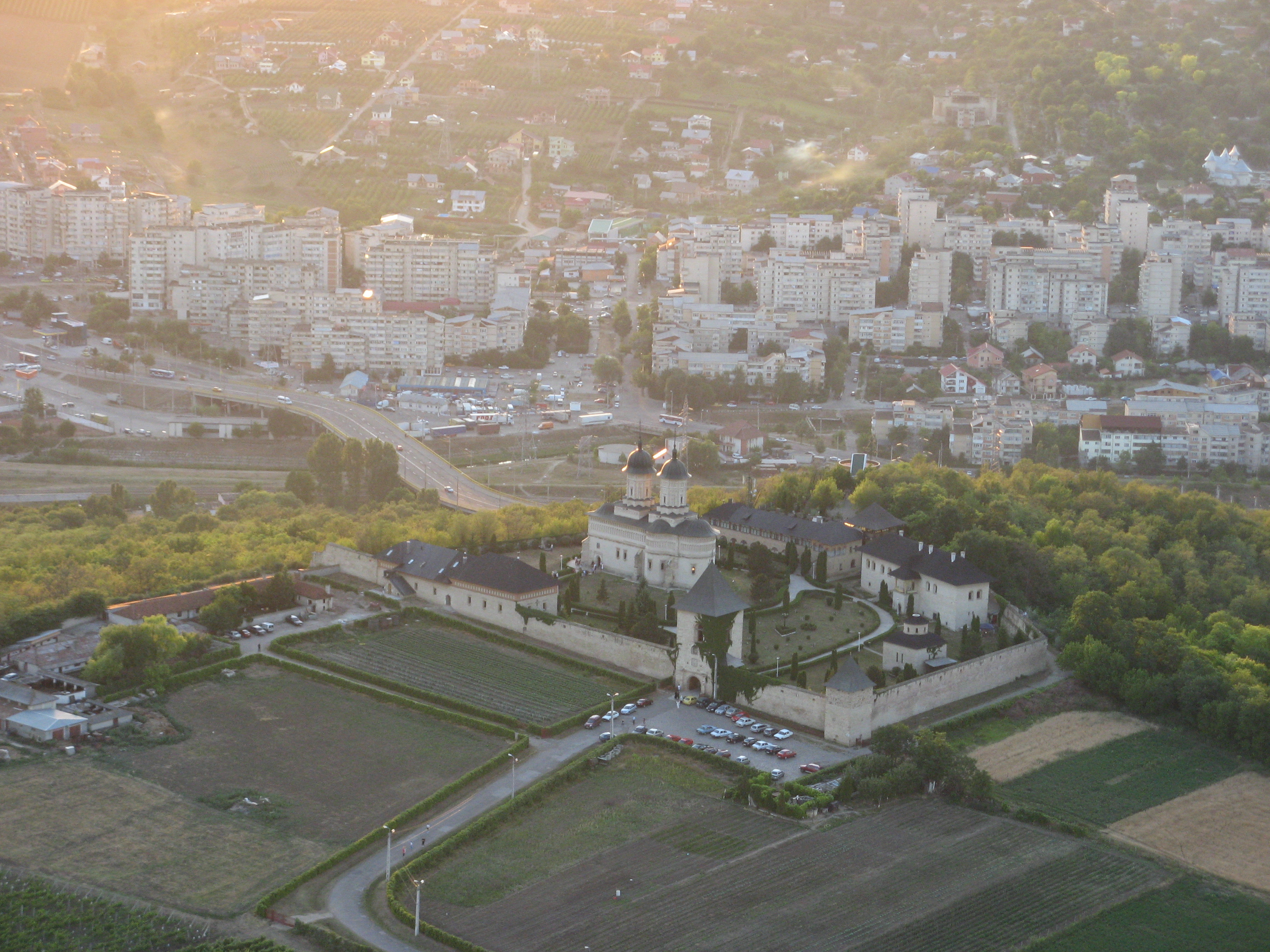 Cetatuia_Aerial